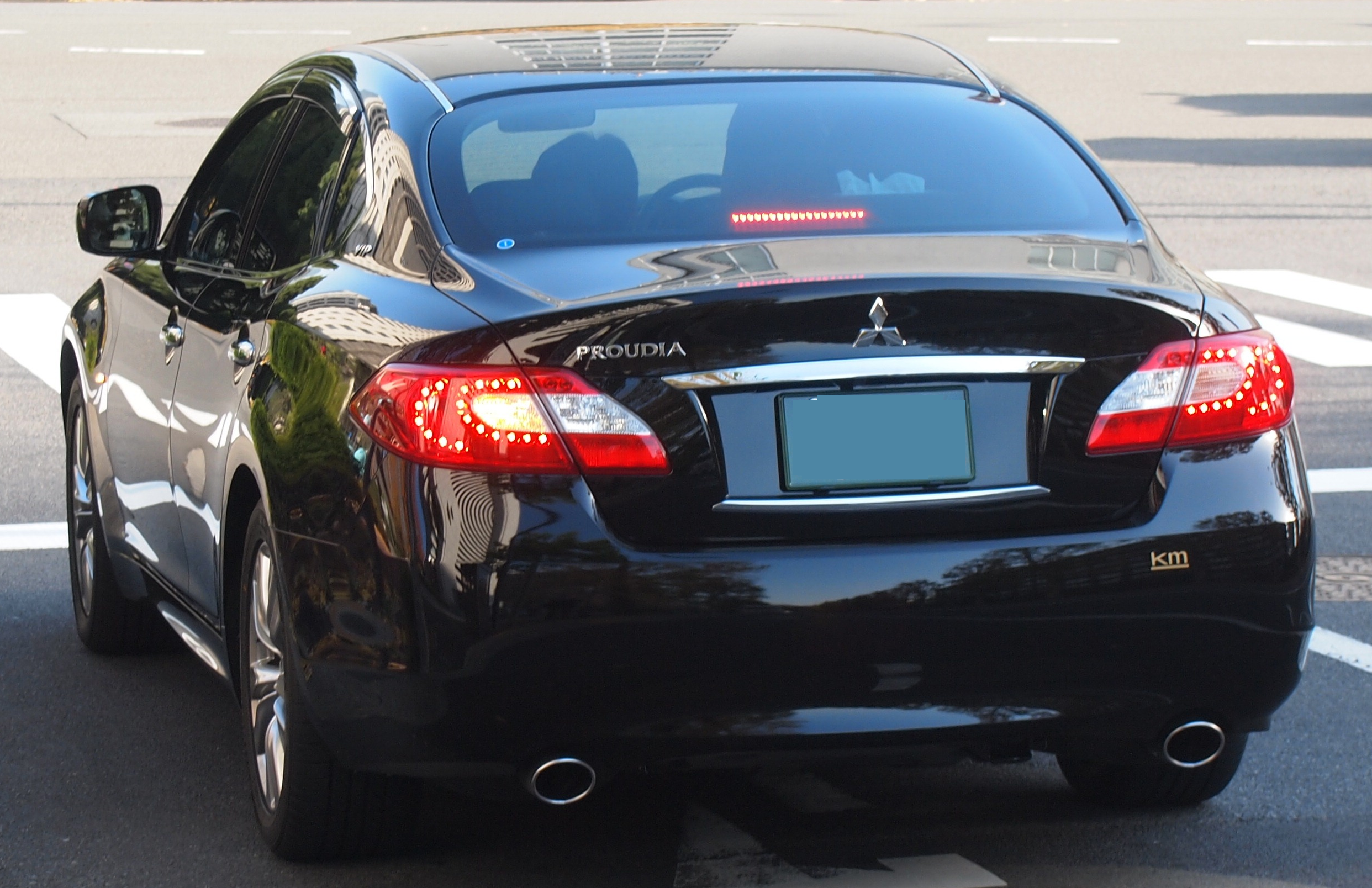 三菱・プラウディア